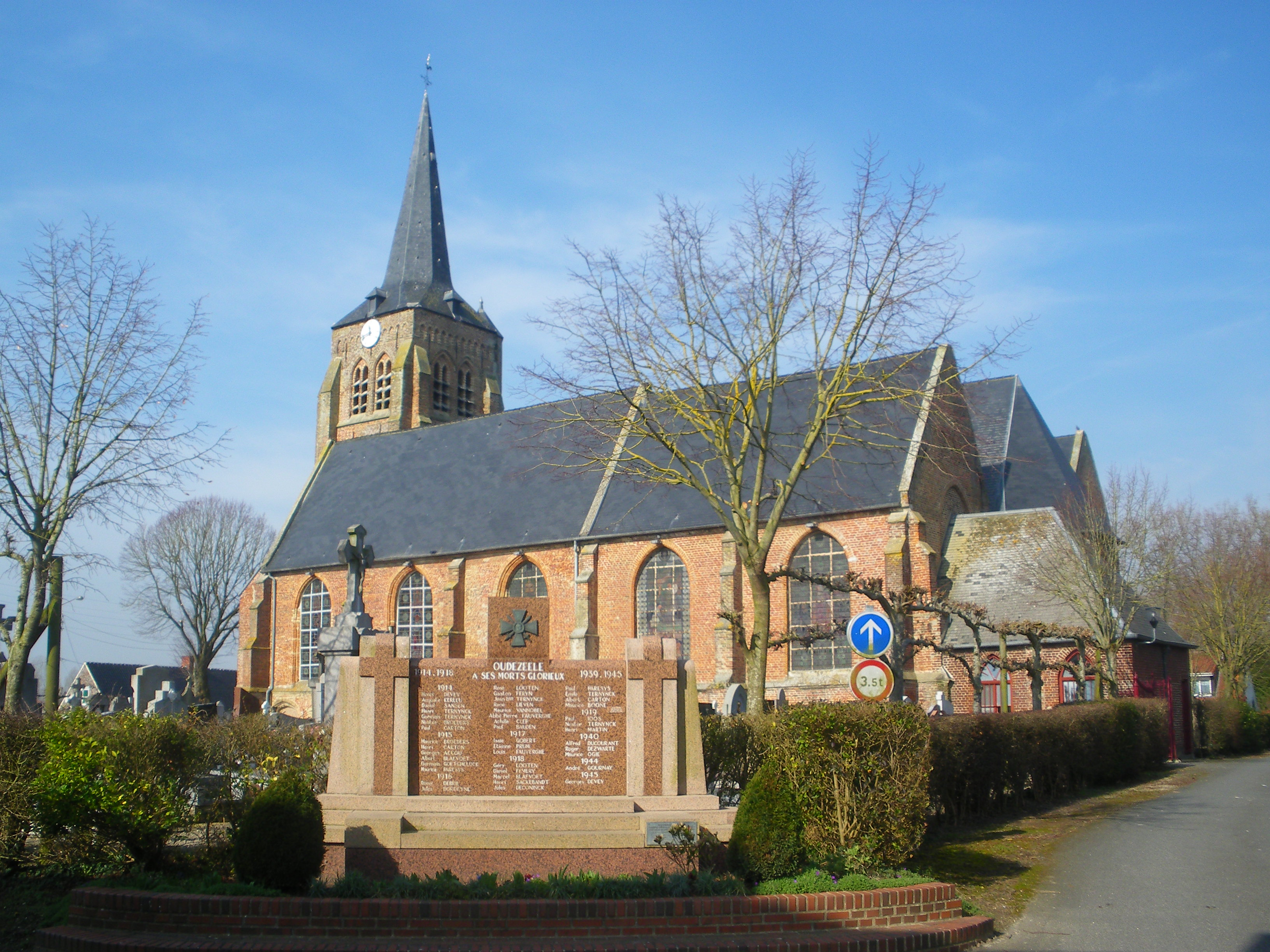 Vue du monument aux morts et de l'église Saint Jean-Baptiste d'Oudezeele.